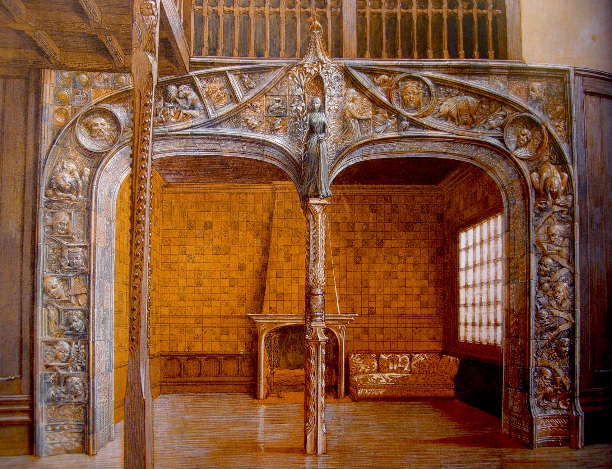 L'aquarelle d'Eugène Grasset représentant le premier état du projet de Porte de Parsifal de Jean-Joseph Carriès en 1890.